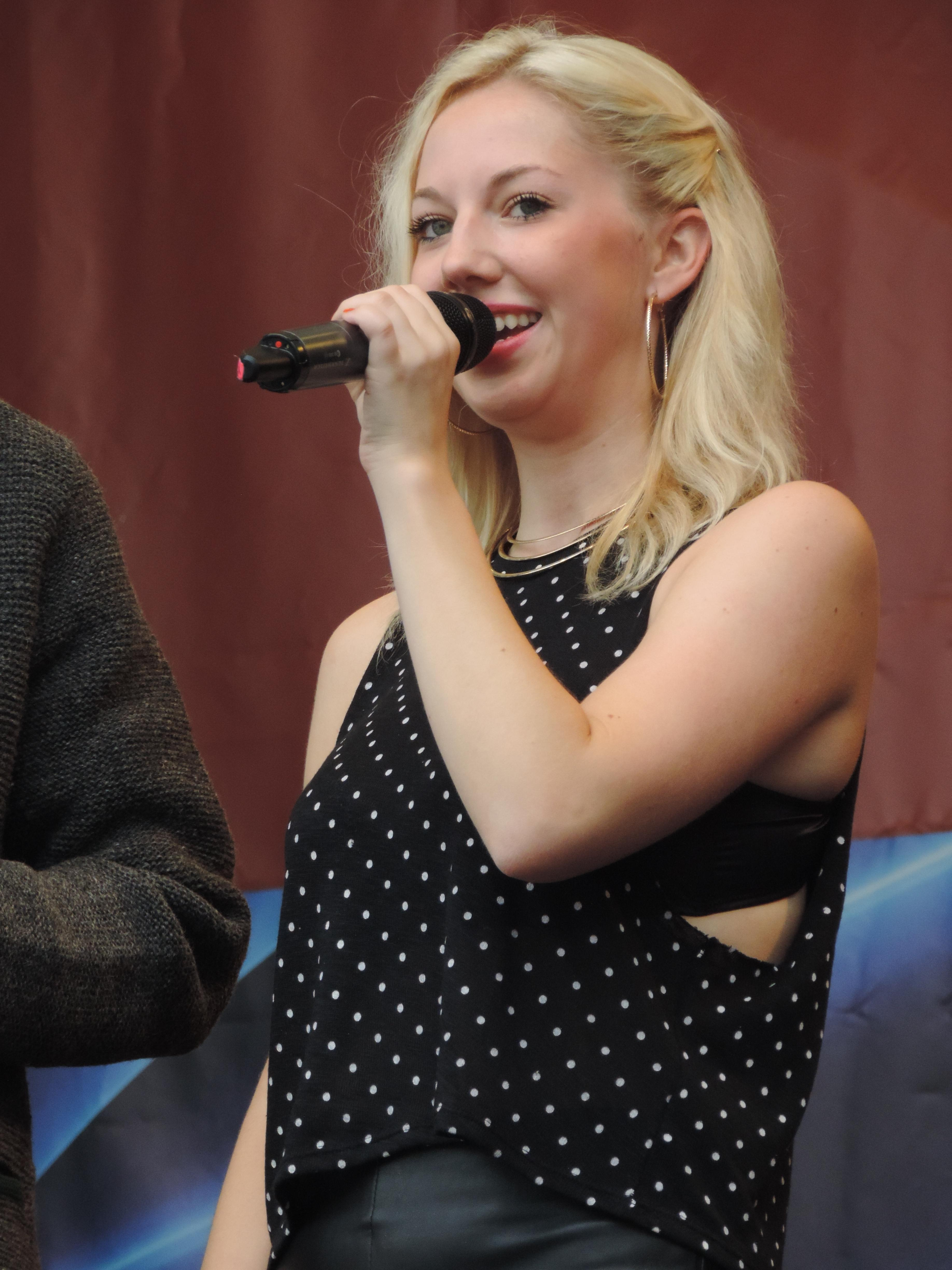 Selina Bübl live beim Linzer Kronefest 2014